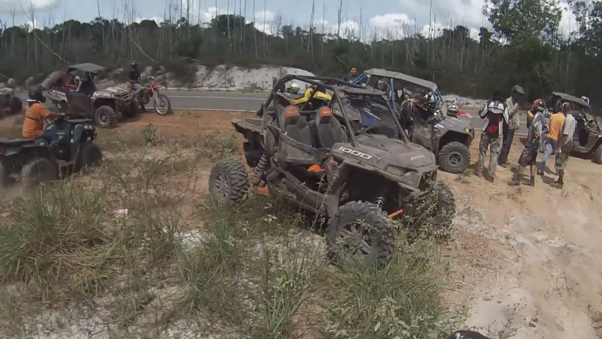 Enduro Suriname Savanne